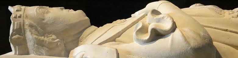 Prikaz kralja Navare Sanča VII. (Sancho), sarkofag.